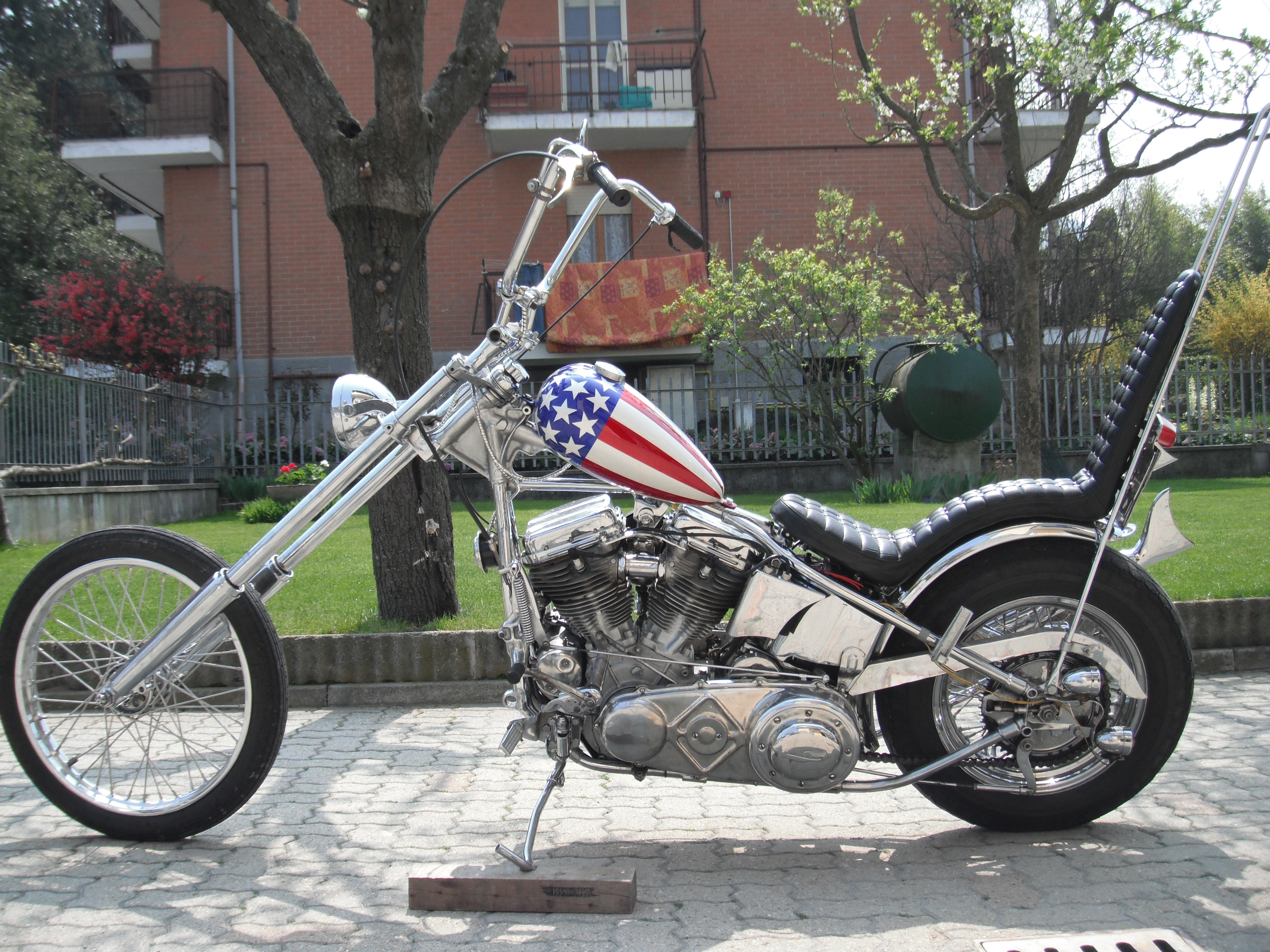 replica fedele di Captain America